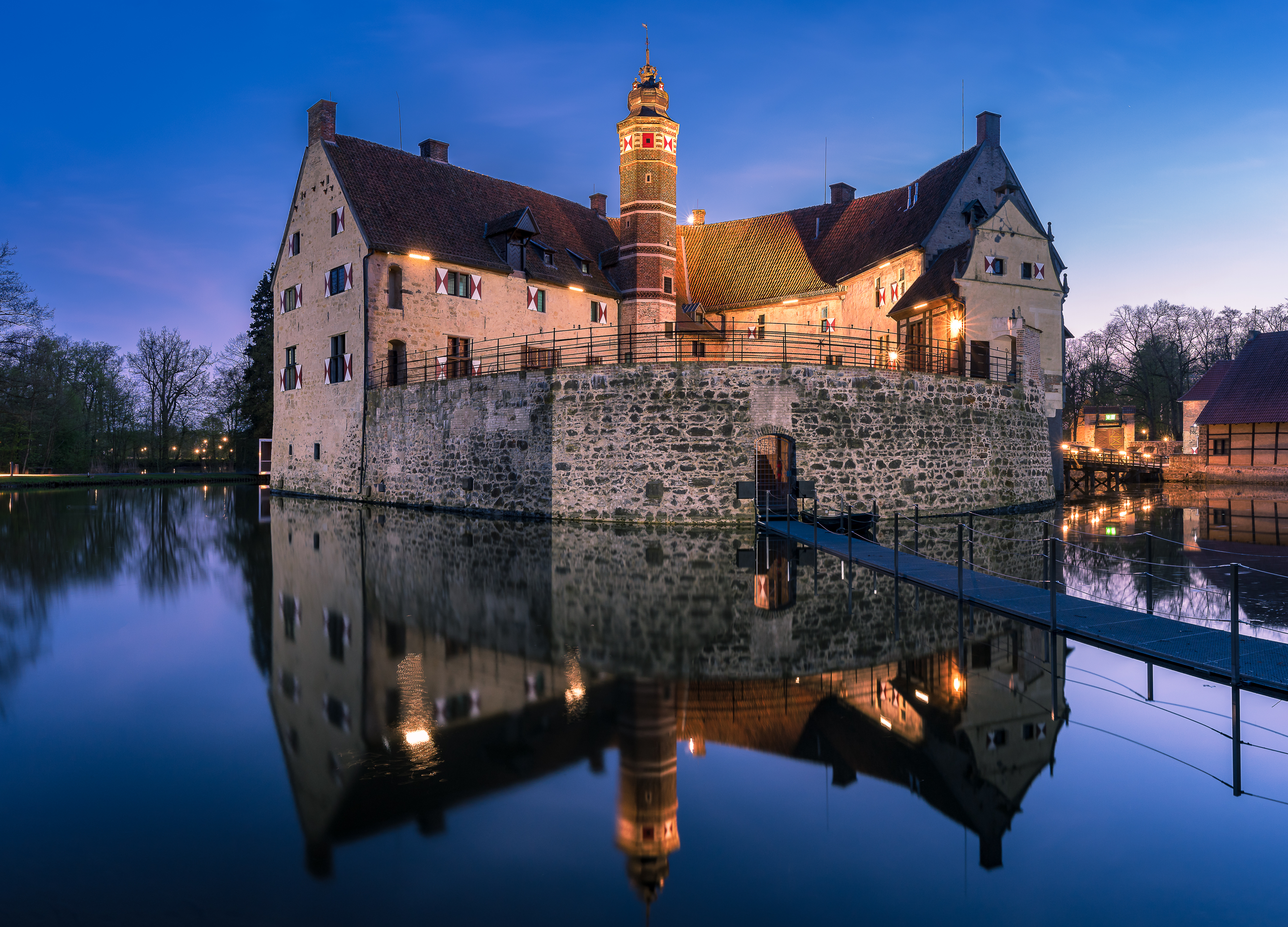 Die Burg Vischering in Lüdinghausen zur blauen Stunde.This is a photograph of an architectural monument., no. 0